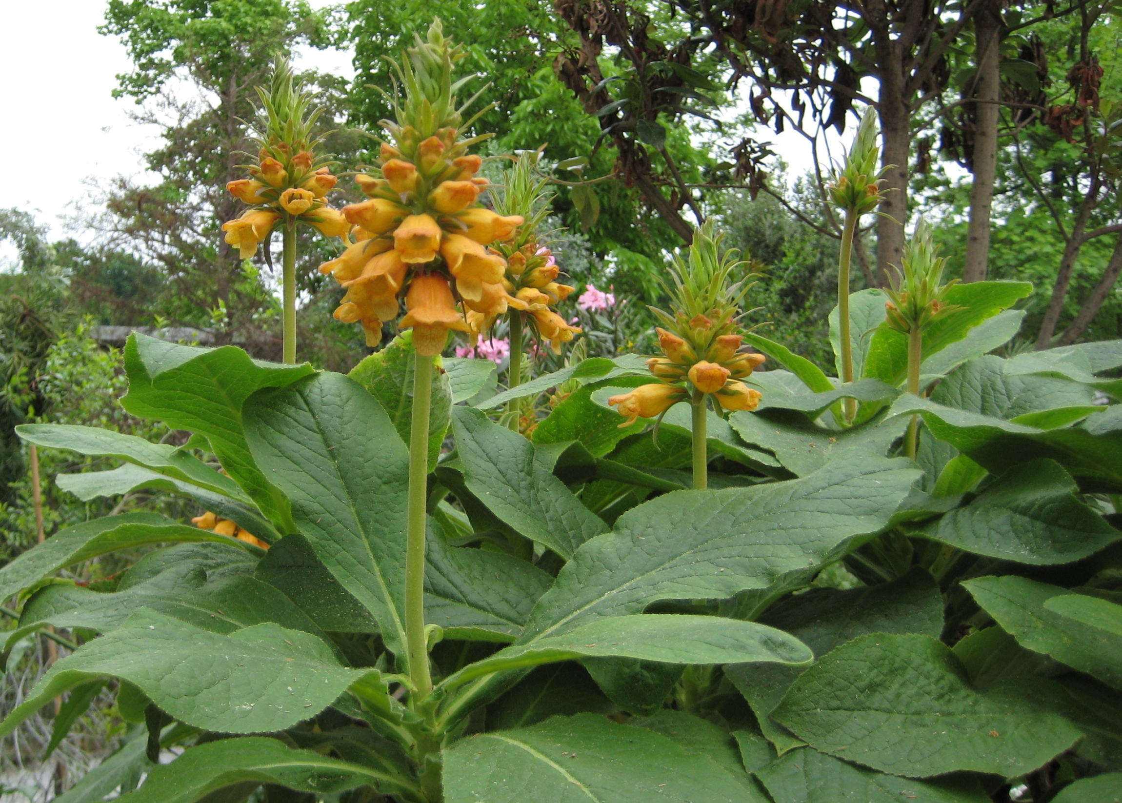 Isoplexis sceptrum im Botanischen Garten Dresden